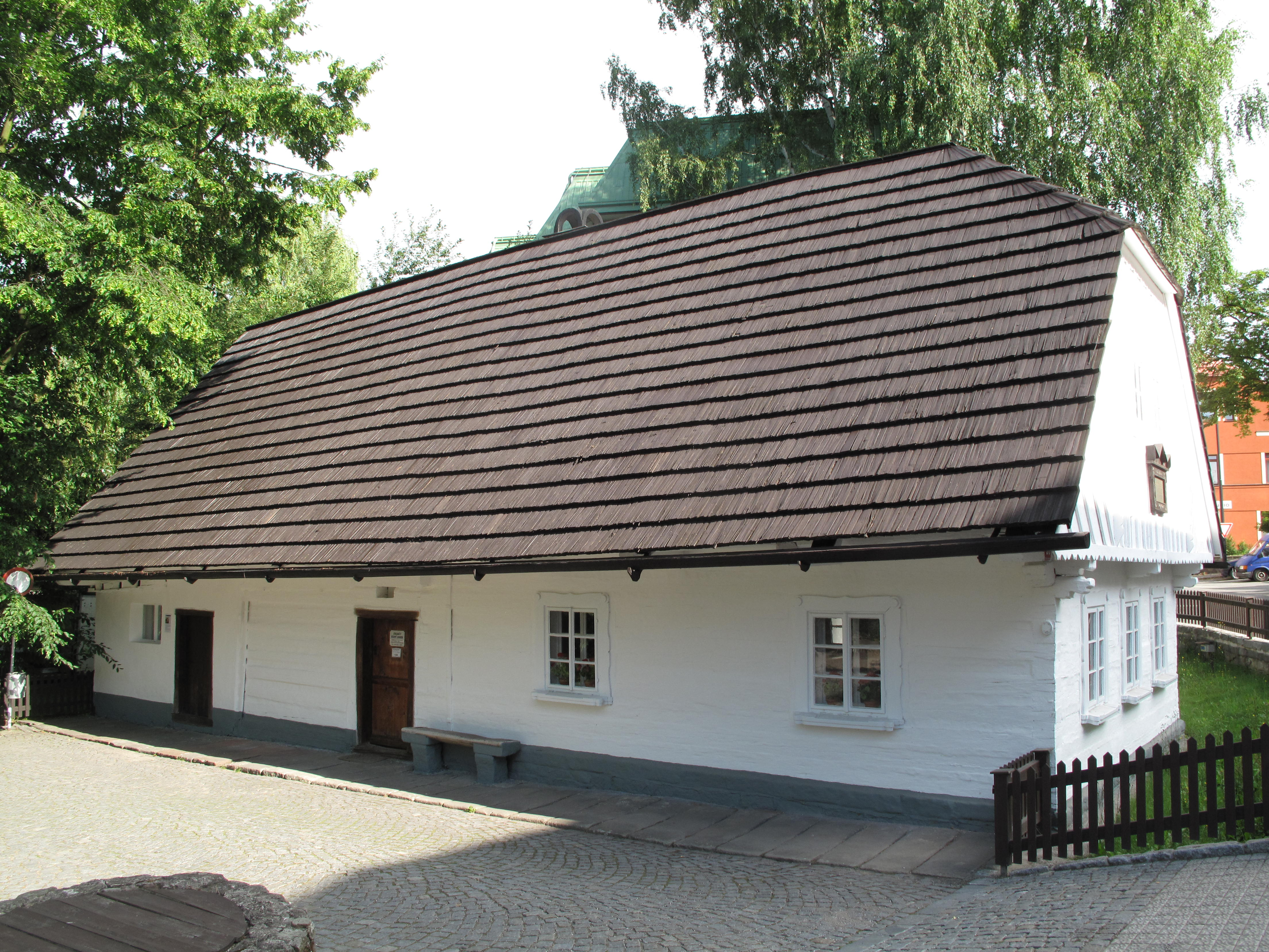 Jiráskův dům v Hronově